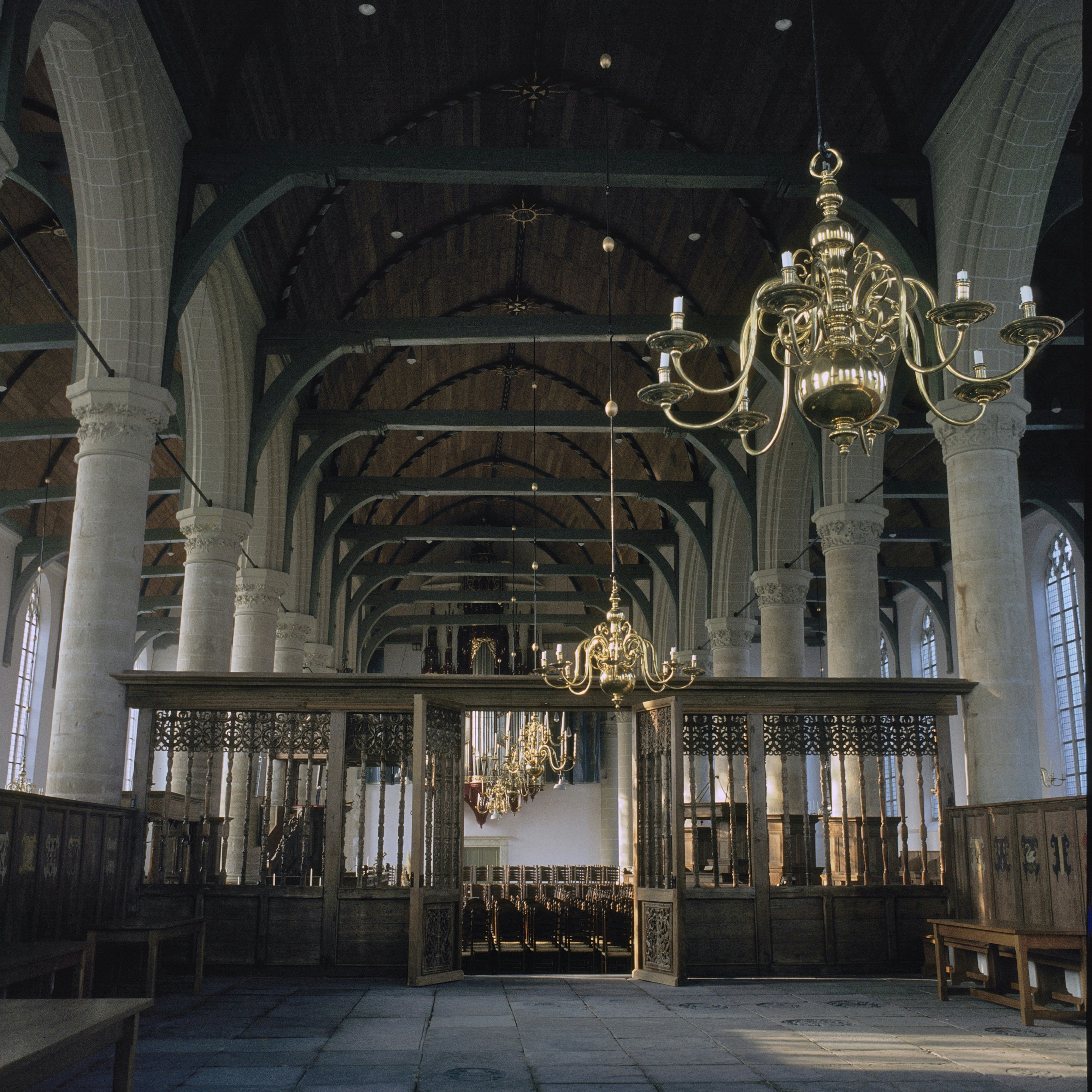 Grote Kerk: Interieur, overzicht naar westen met koorhek, gezien vanuit het middenkoor